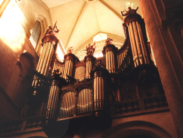 Je suis l'auteur. Io sono l'autore. I took this photo.